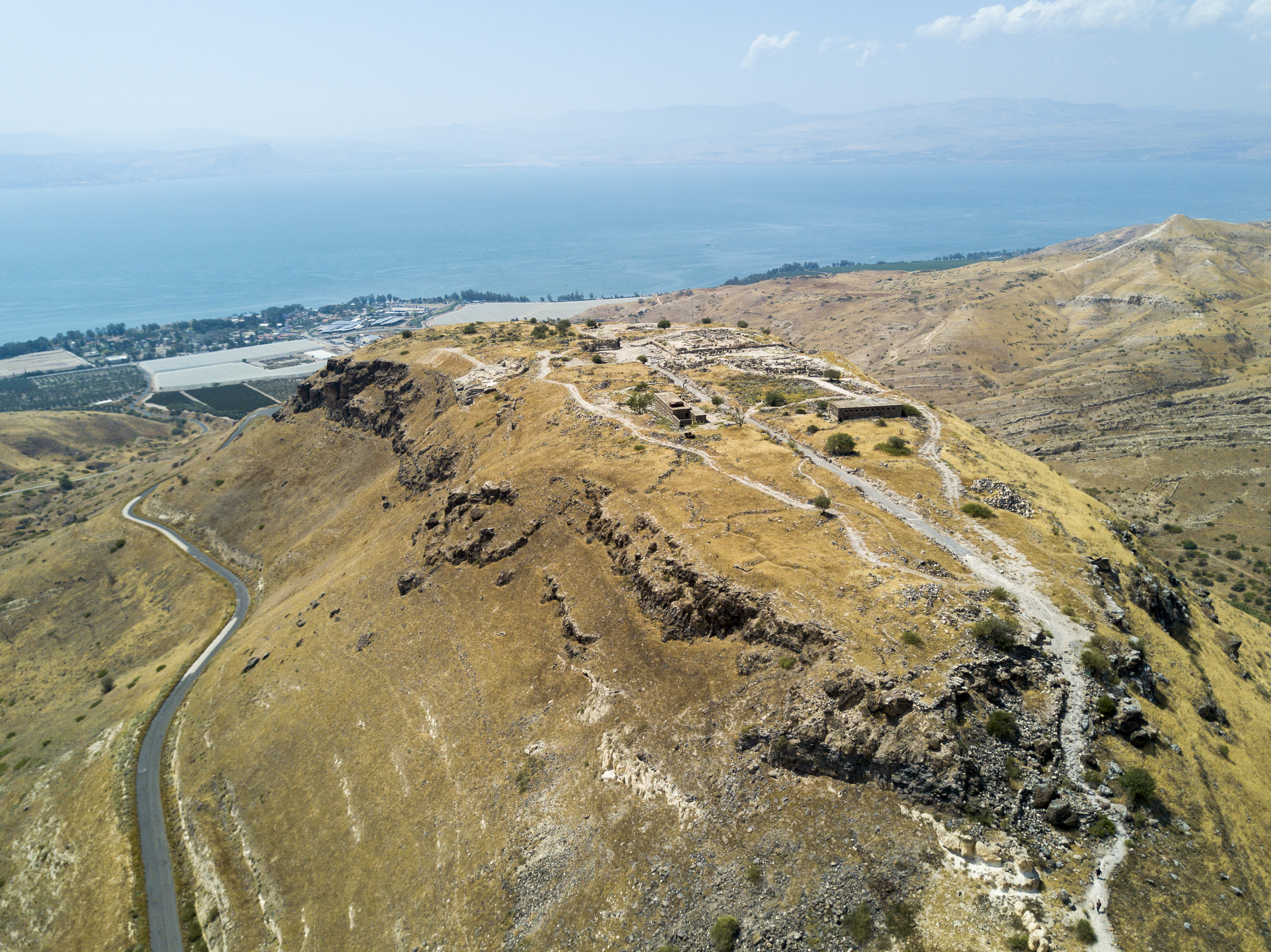 תצלום אוויר של ההר סוסיתא המשקיף על הכנרת וקיבוץ עין גב